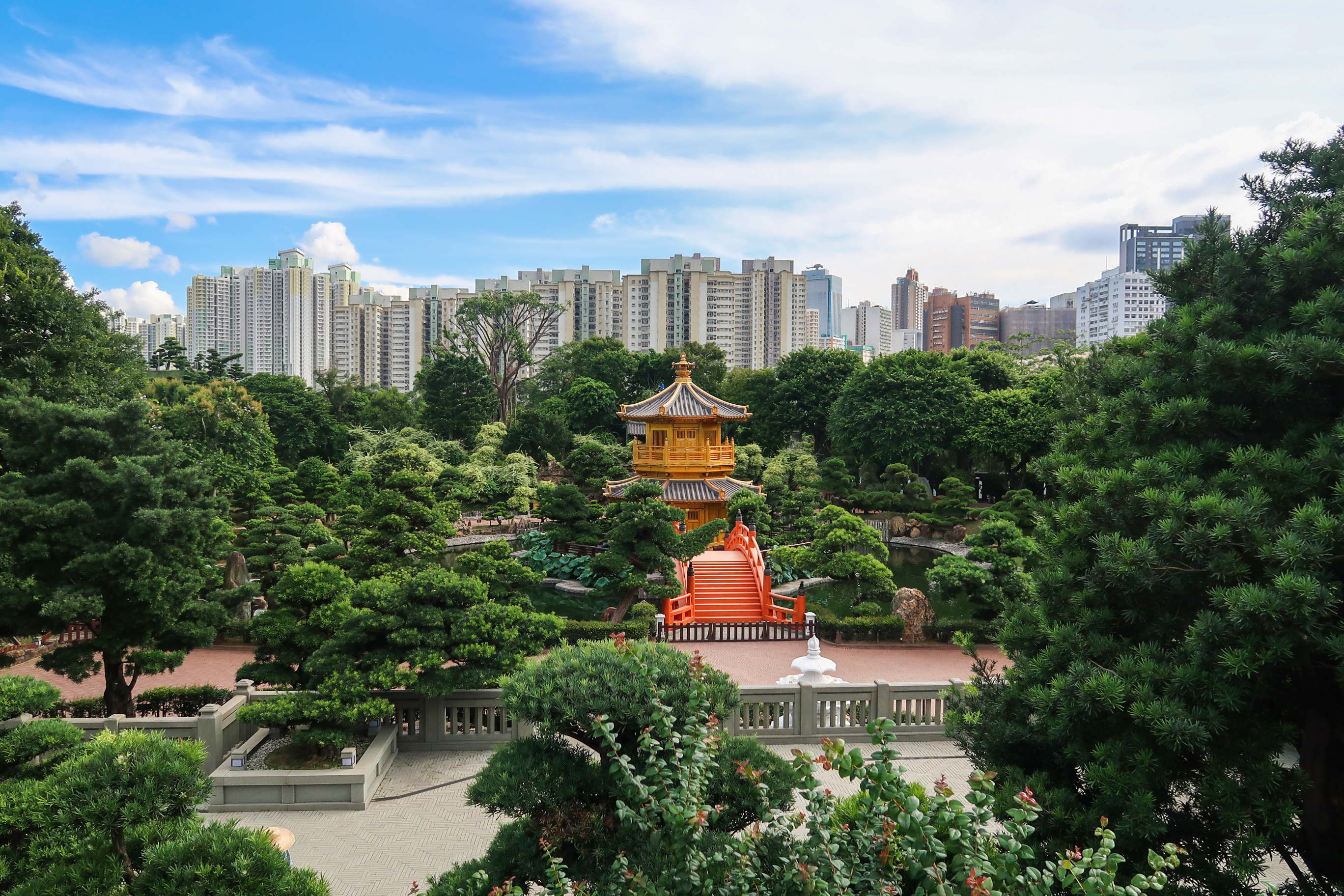 Nan Lian Garden